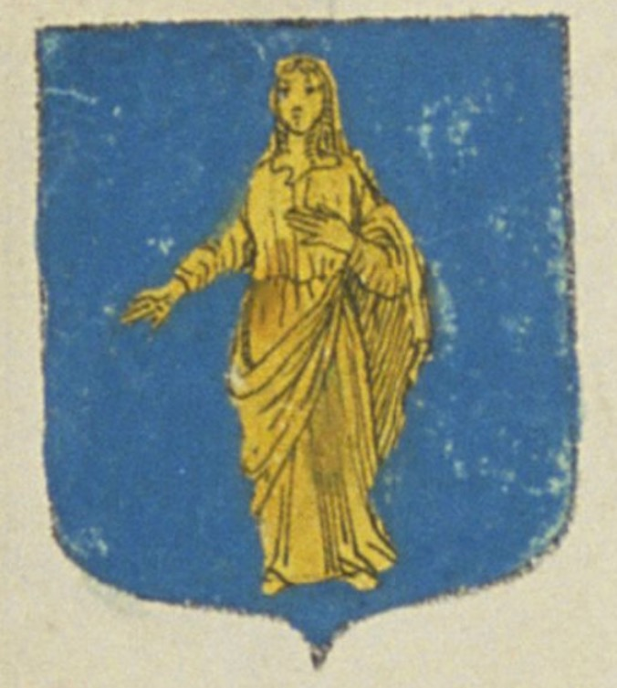 Saturargues. Forme ancienne du blason (XVIIe siècle)